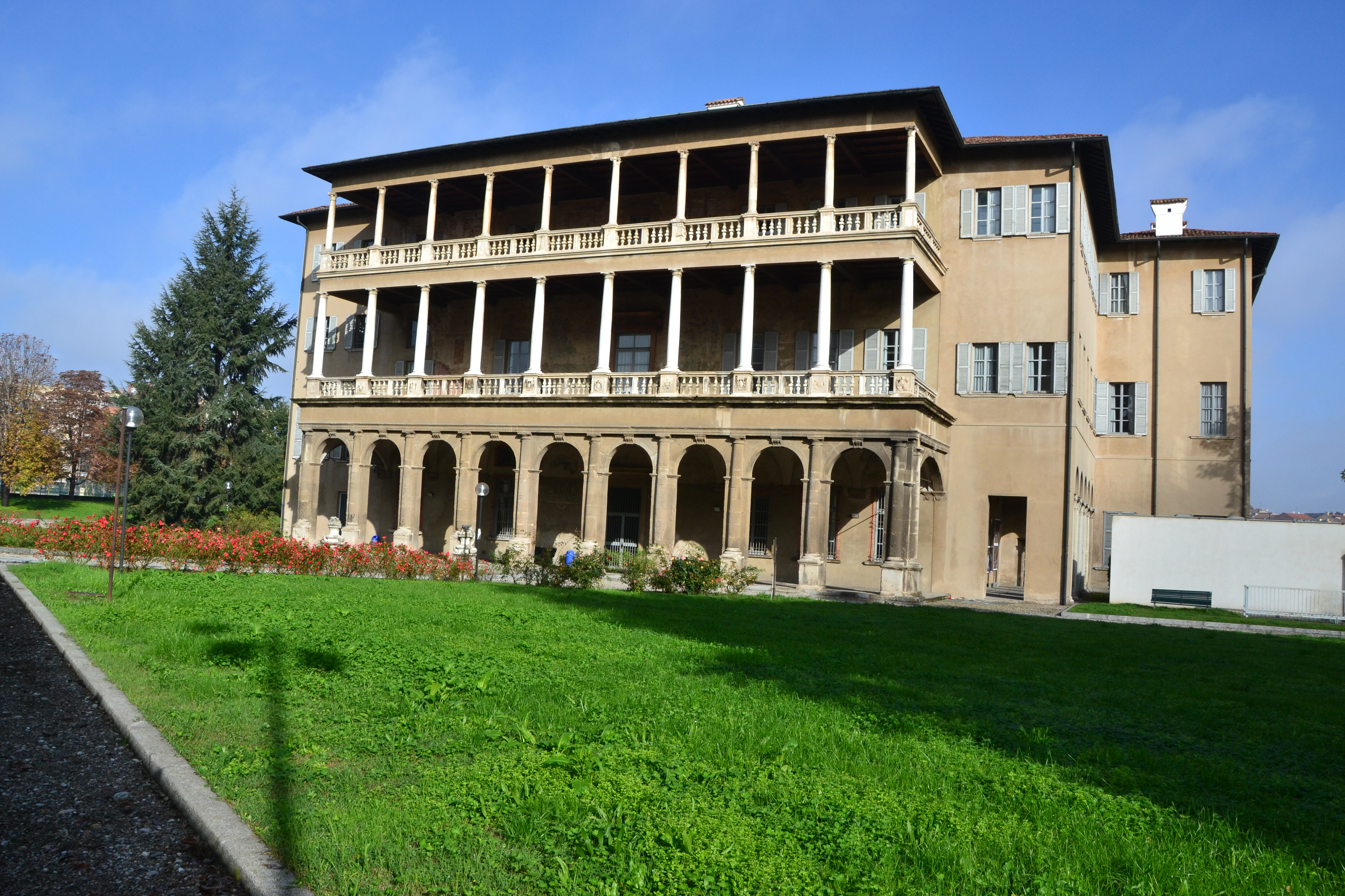 Villa Simonetta è una villa patrizia rinascimentale situata a Milano in via Stilicone 36, edificata alla fine del XV secolo Oggi la villa è di proprietà comunale